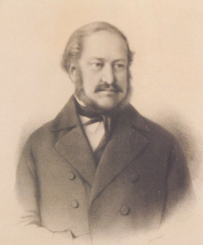 Frnaz von Zwerger, zeitgenössische Lithographie